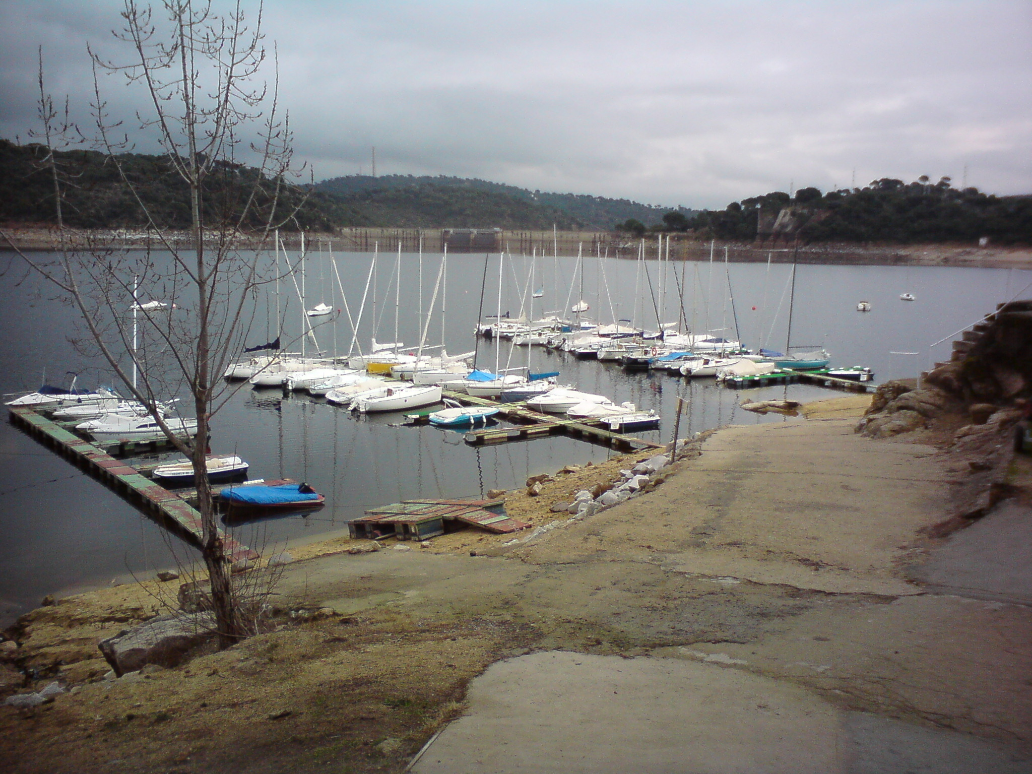 Embalse de San Juan, España.